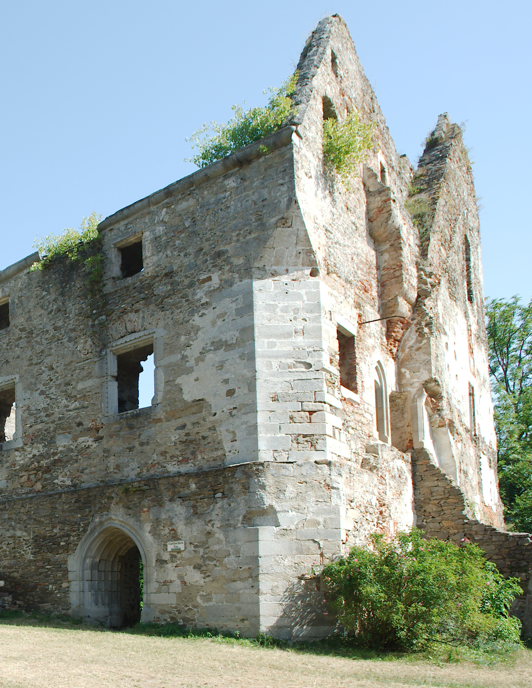 Burgruine Schaunberg in Schaumberg, Oberösterreich; Palas mit gotischem Torbogen, gut sichtbar die mächtigen Eckmauern; Sicht vom Brunnen in Richtung inneres Burgtor